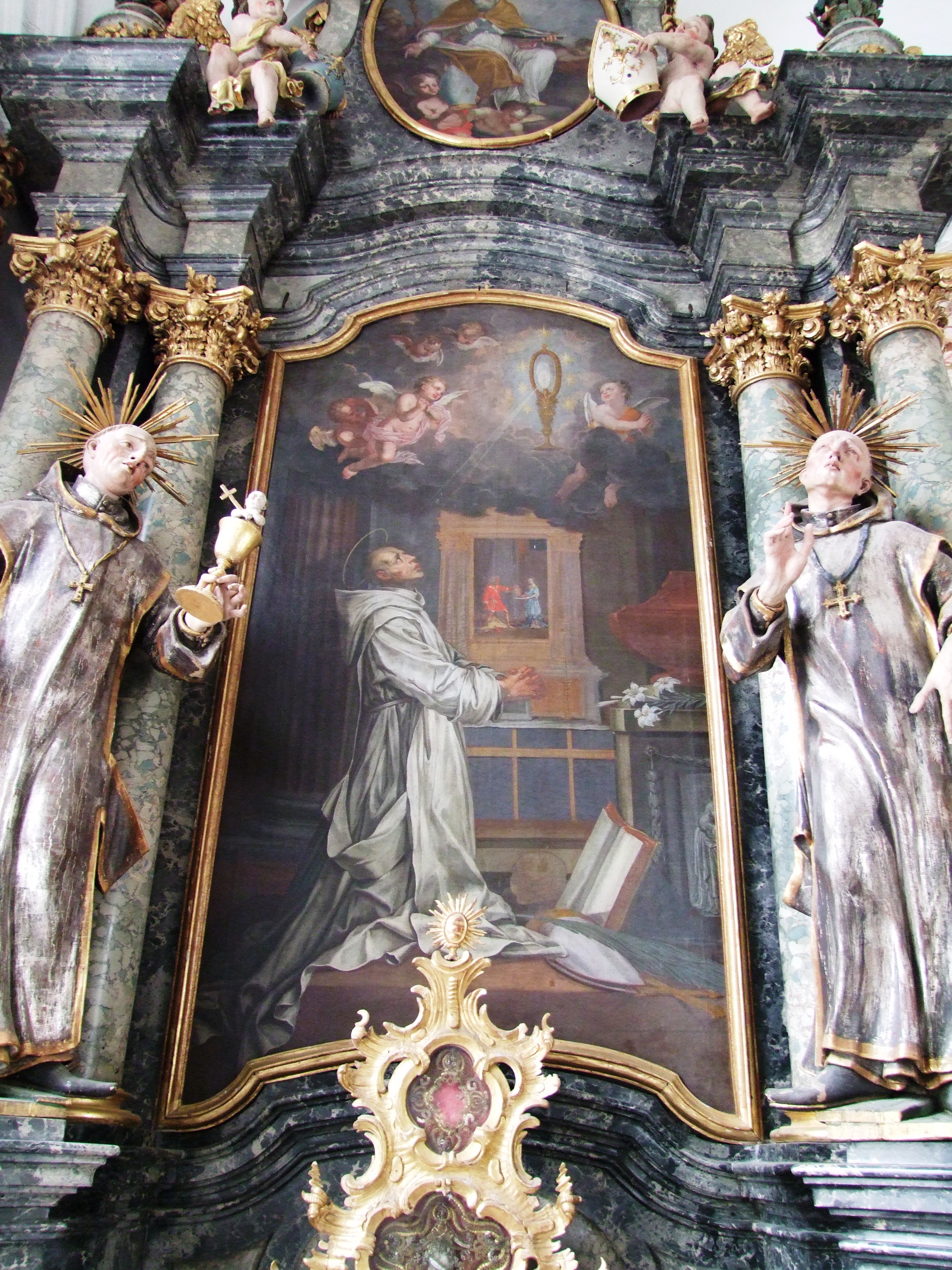 St. Maria im oberschwäbischen Buxheim bei Memmingen. Nördlicher Lettneraltar, "Heiliger Bruno im Gebet vor einem Altar"